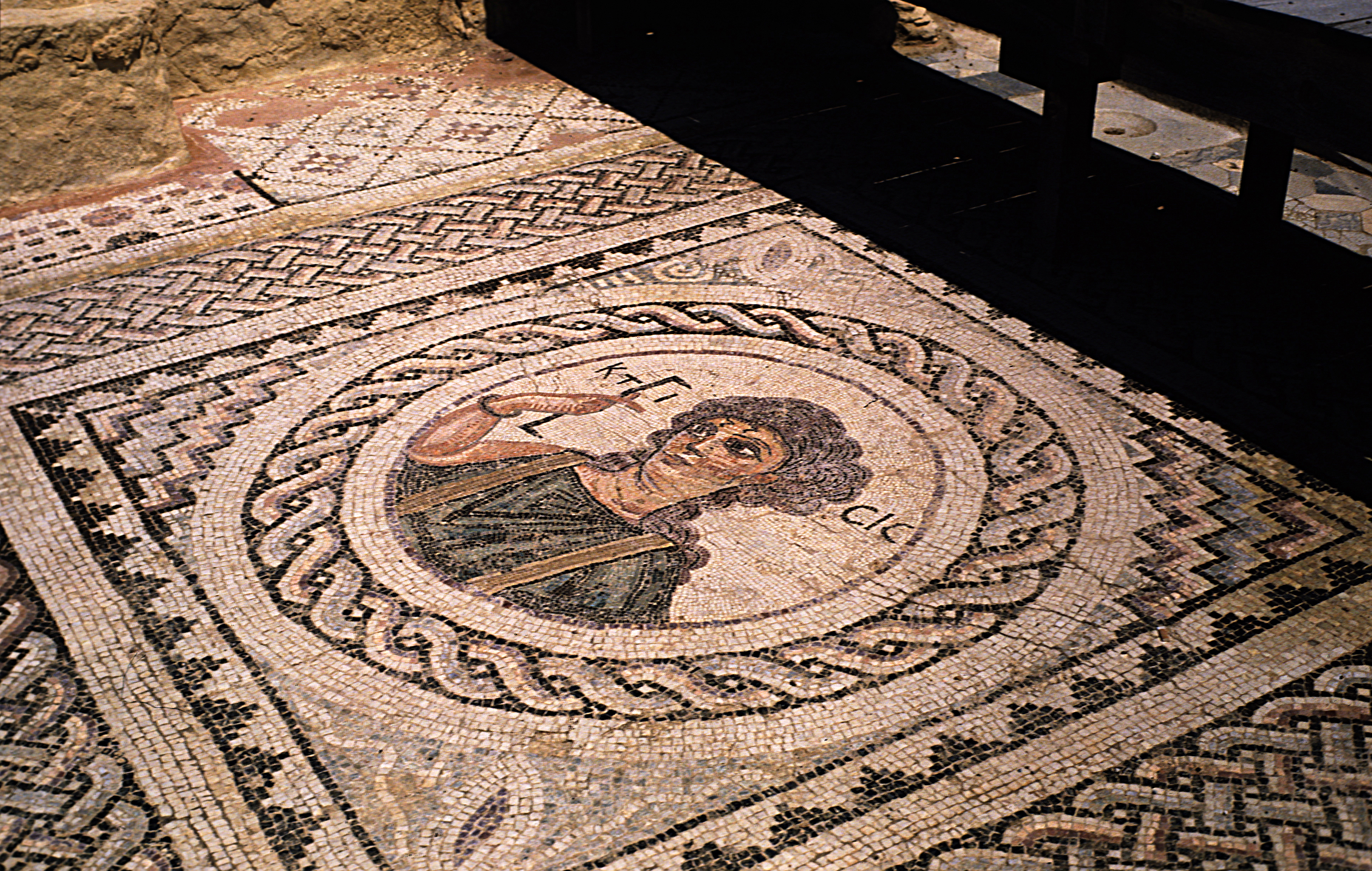 Am Eingang der Villa des Eustolios das Mosaik der Göttin Ktisis, die Verkörperung der Schöpferkraft, des Messens und Maßhaltens und die einen römischen Fuß in der Hand hält (Kourion, Zypern).